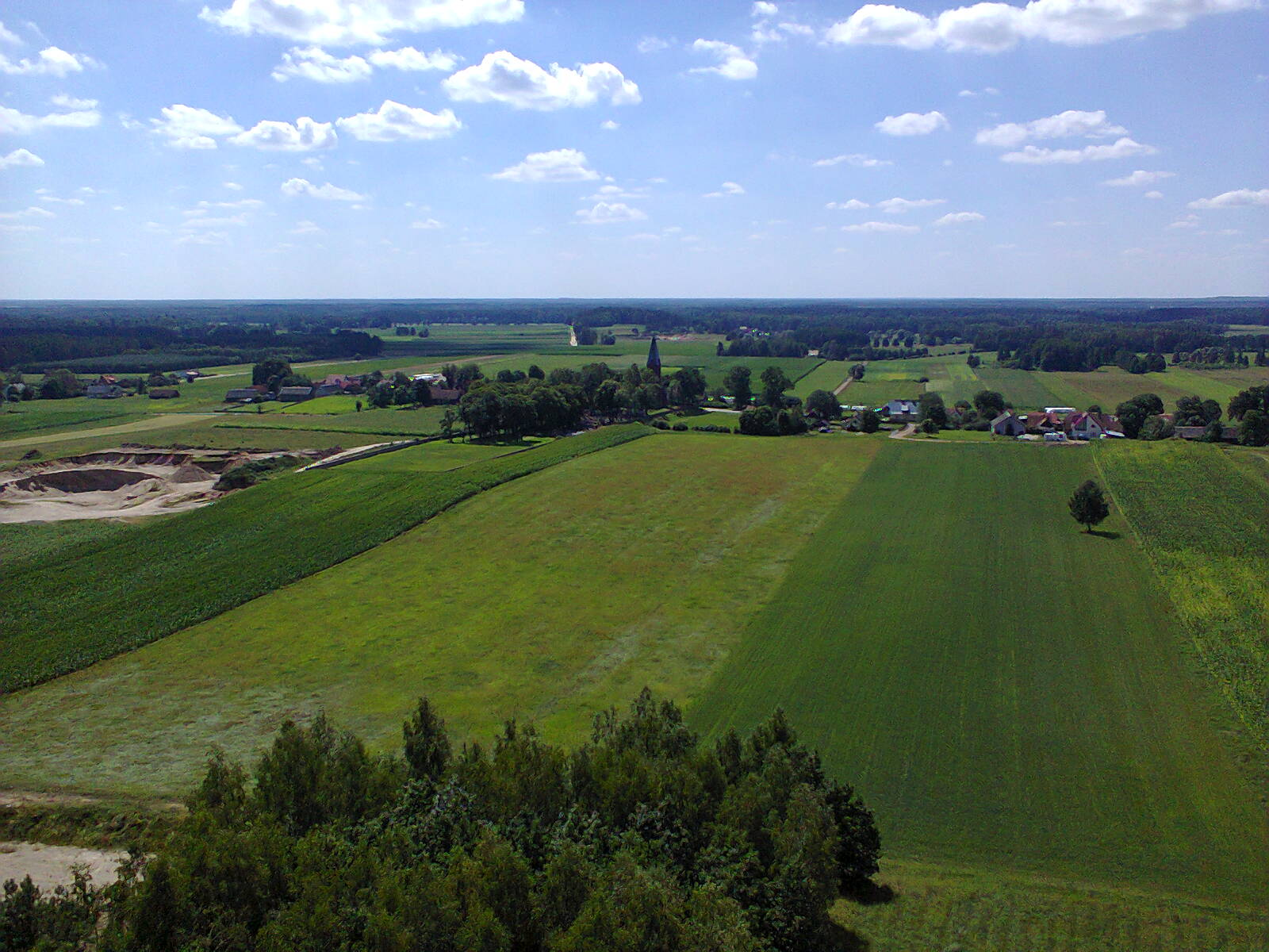 Widok z wieży przeciwpożarowej w Klonie (powiat szczycieński)